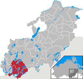 Amt Wesenberg in Mecklenburg-Vorpommern- District Mecklenburg-Strelitz (1992-1999)